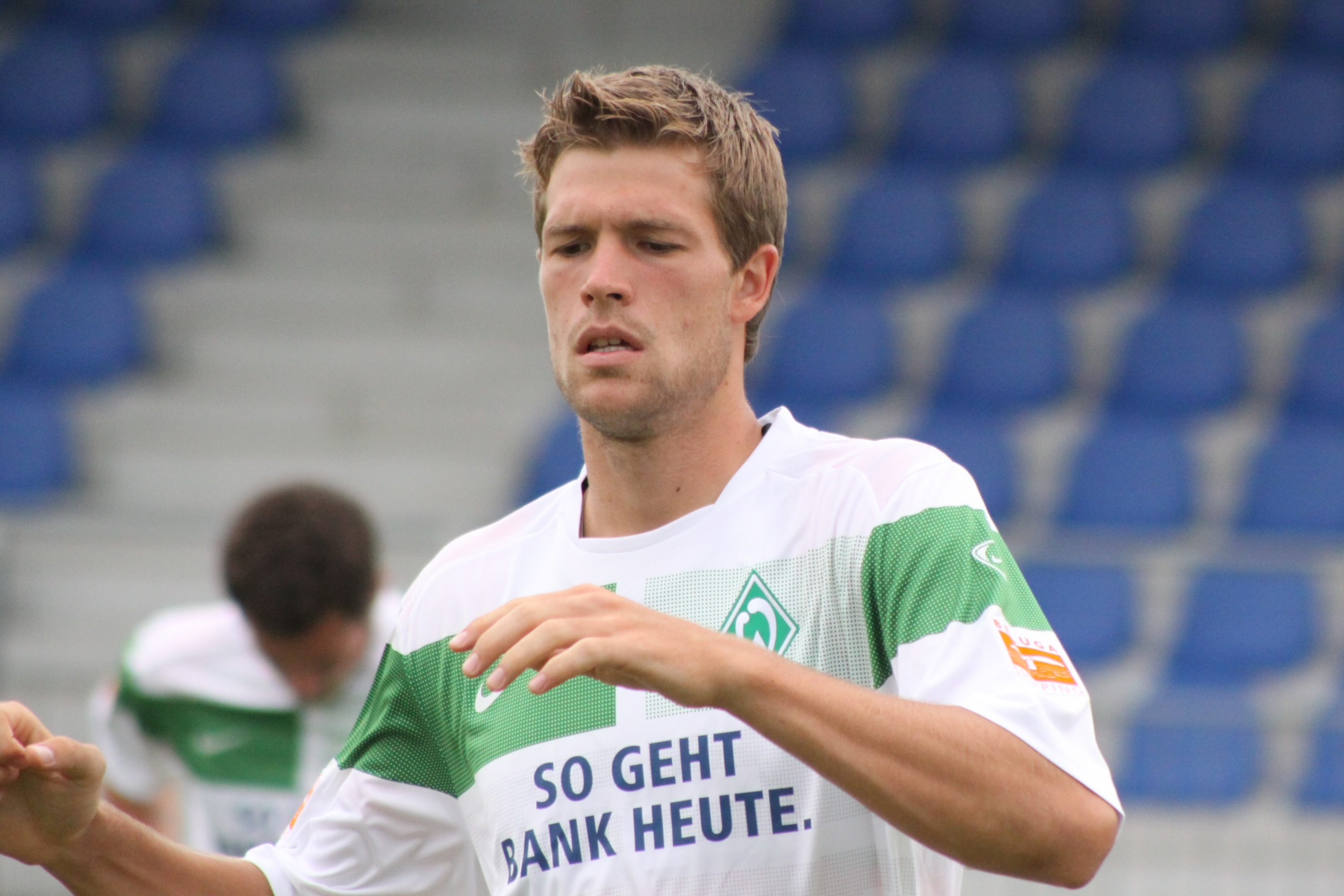 Márkó Futács - SV Werder Bremen (3)